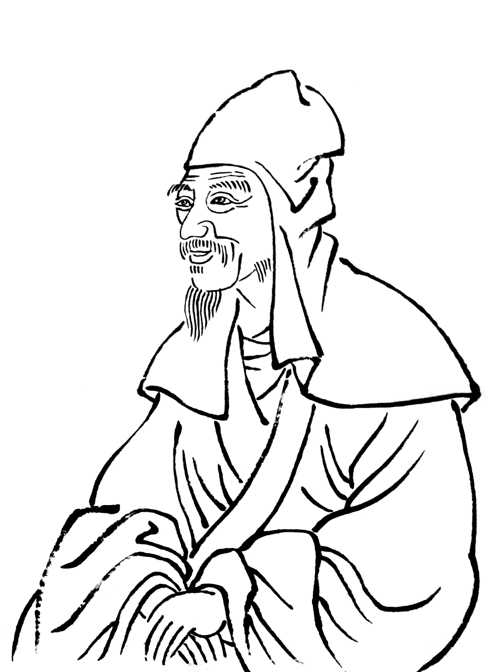 中文（中国大陆）: 大理州博物馆-人像-李元阳